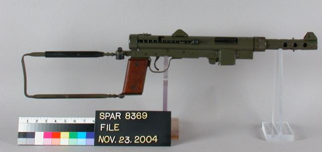 Carl Gustav M/45